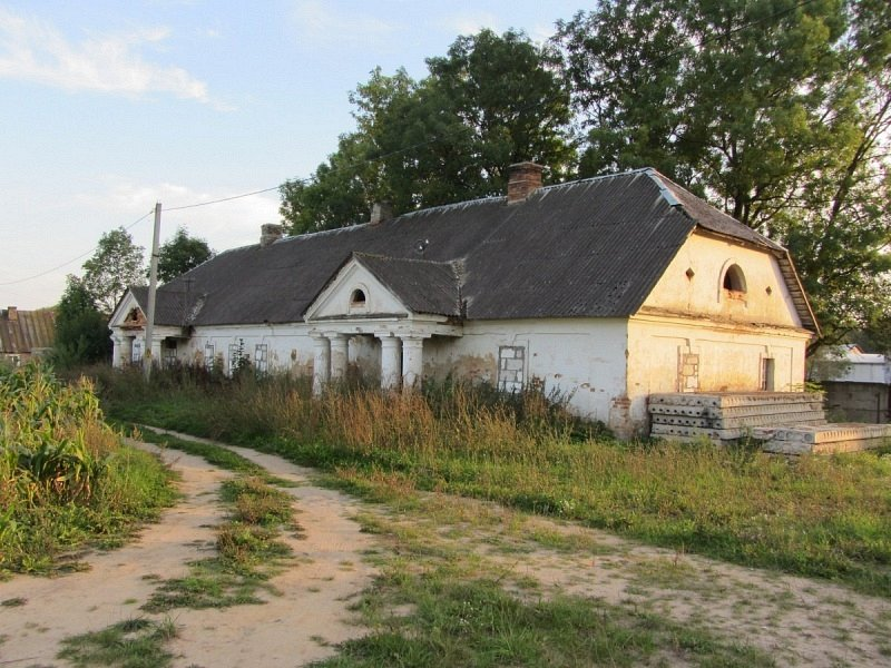 Вялікае Мажэйкава. Дом для рабочых